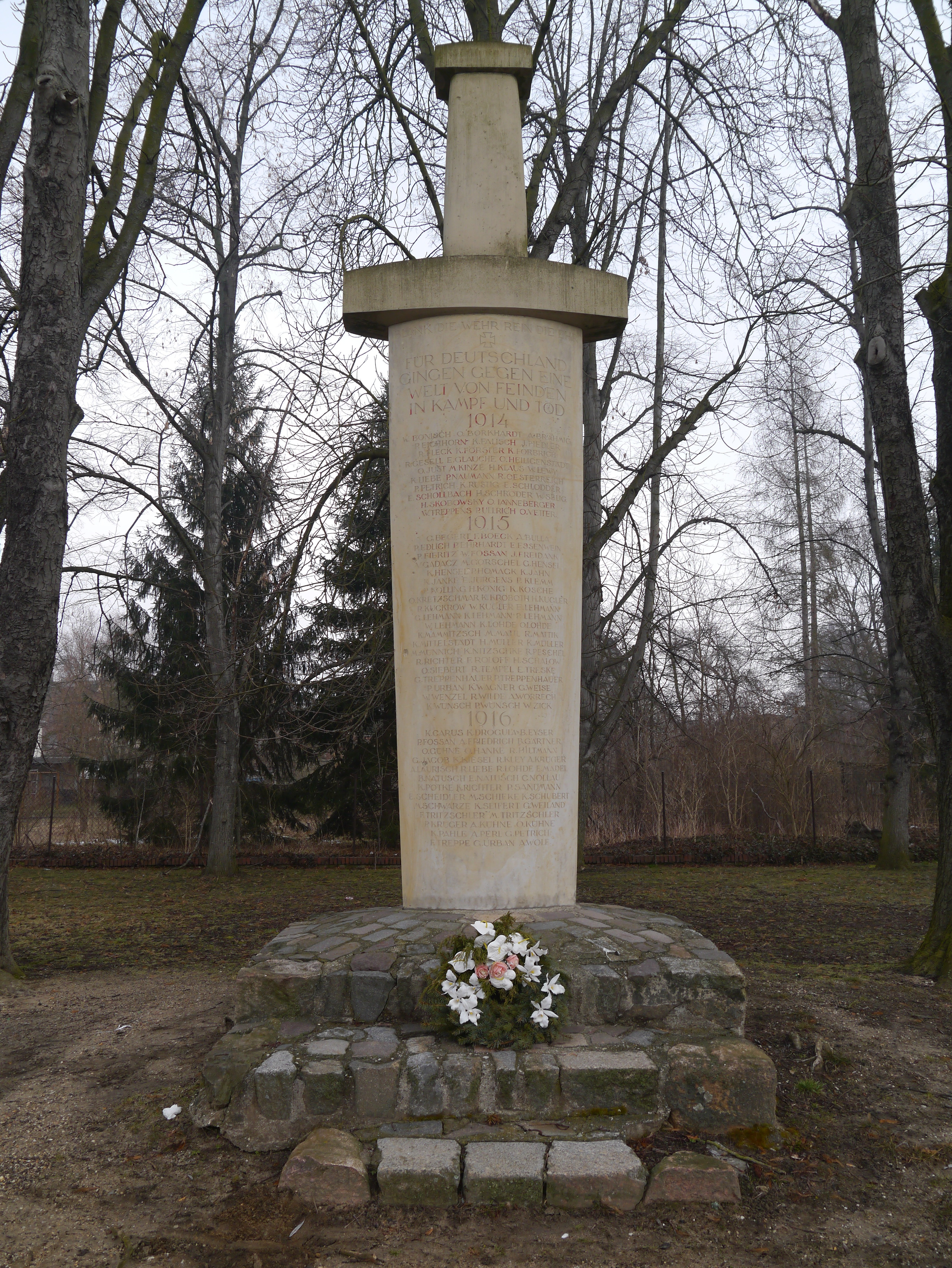 Schwert-Denkmal für die Gefallenen des I.Weltkrieges 1914-1919, errichtet 1934 in Doberlug-Kirchhain, OT Kirchhain.